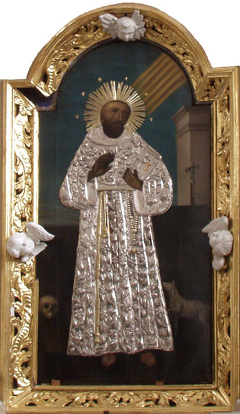 «Святы Францішак». XVIII ст. Абраз з гродзенскага францішканскага касцёла